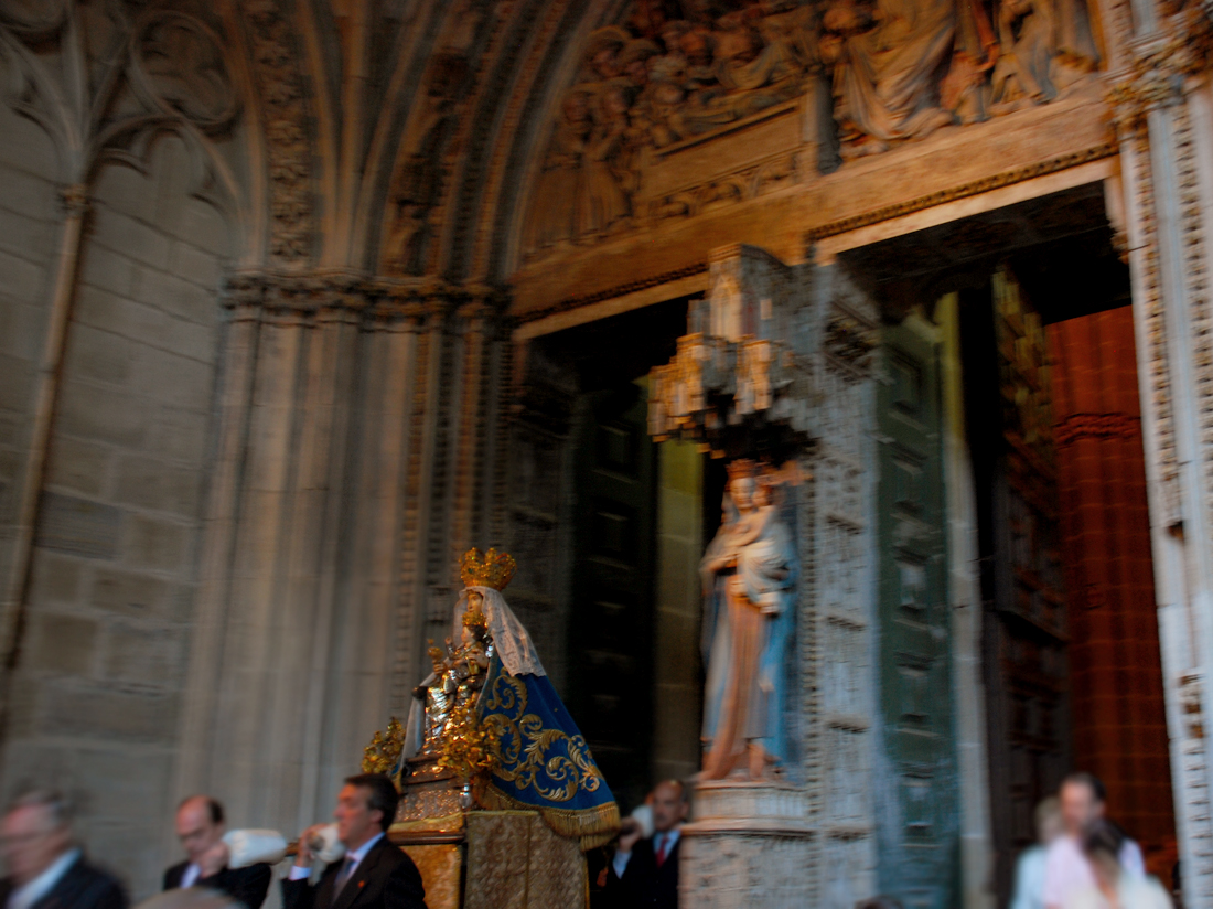 procesion catedral pamplona